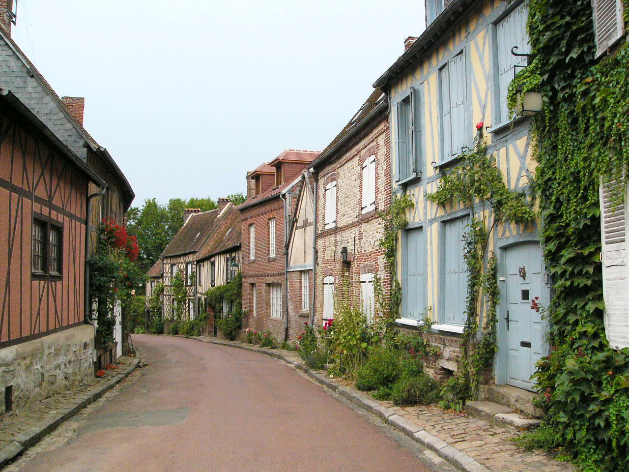 Gerberoy, rue principale